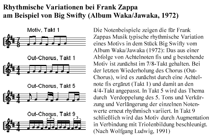 Rhythmische Variationen bei Frank Zappa am Beispiel von Big Swifty (Waka/Jawaka, 1972), textliche Darlegung und vier Takte Notenbeispiele